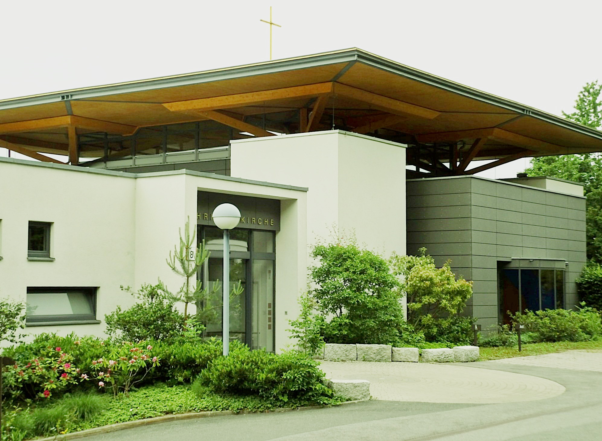 Eingangsbereich der baptistischen Christuskirche Heiligenstadt in Oberfranken, Bayern, Deutschland